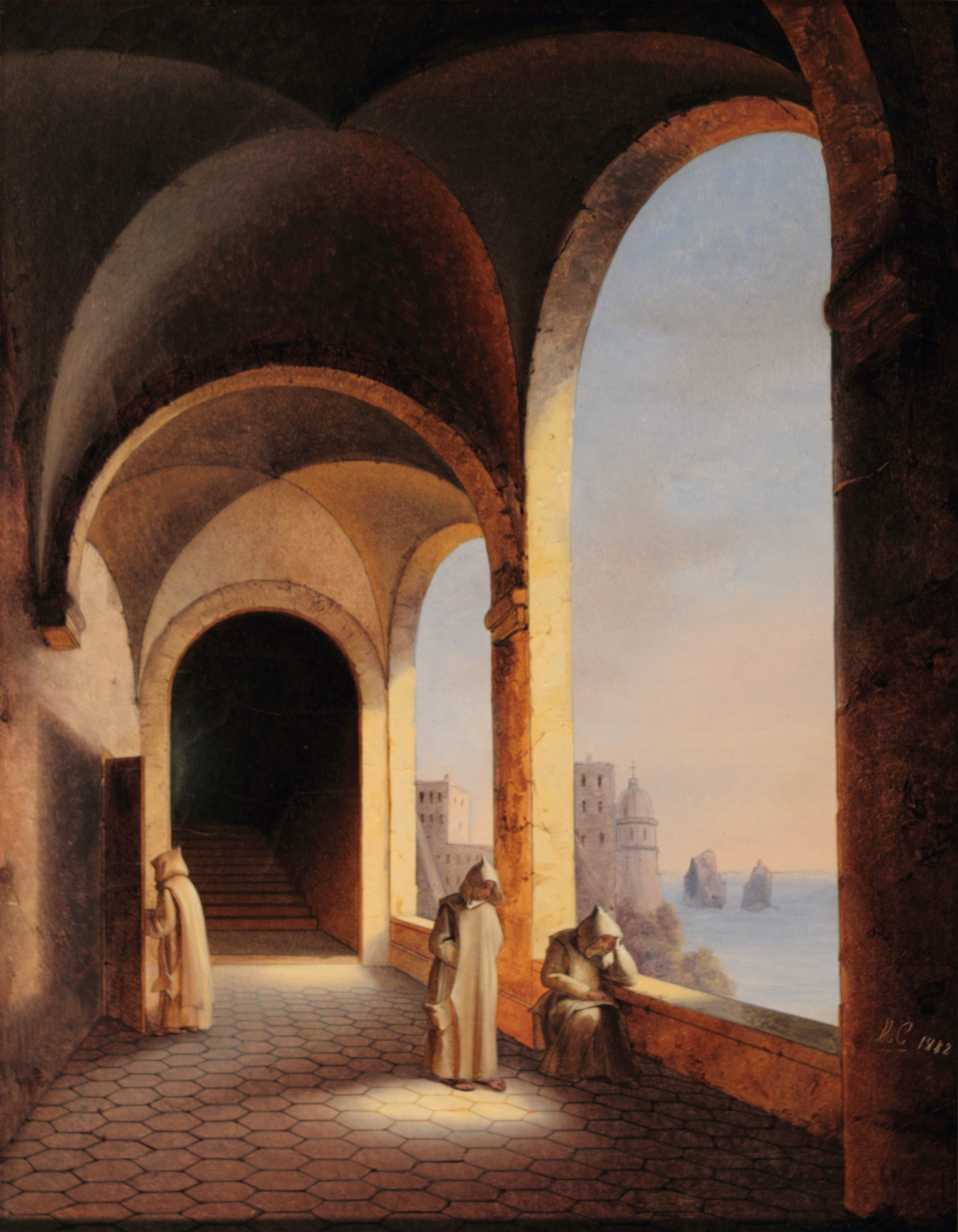 Marie-Caroline de Bourbon - Frères dans la Chartreuse de San Giacomo à Capri